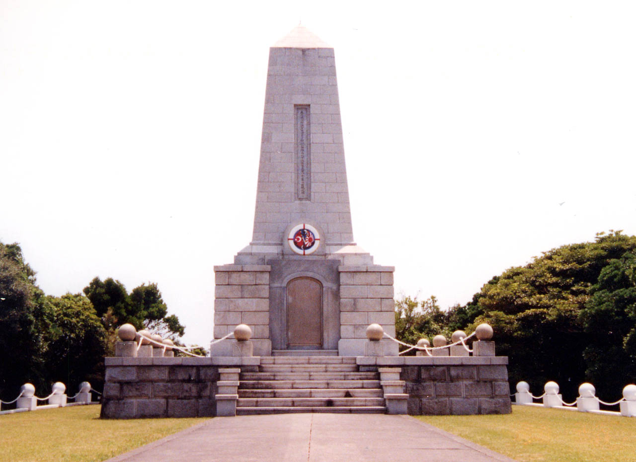 エルトゥールル号遭難慰霊碑 2001年本人撮影